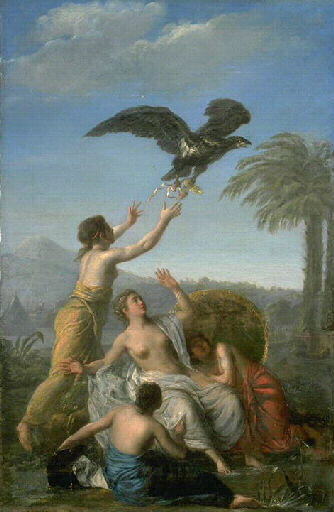 Enlèvement du soulier de Rodope ; Les femmes se baignant au bord de la rivière (ancien titre) ; Baigneuses turques (ancien titre)